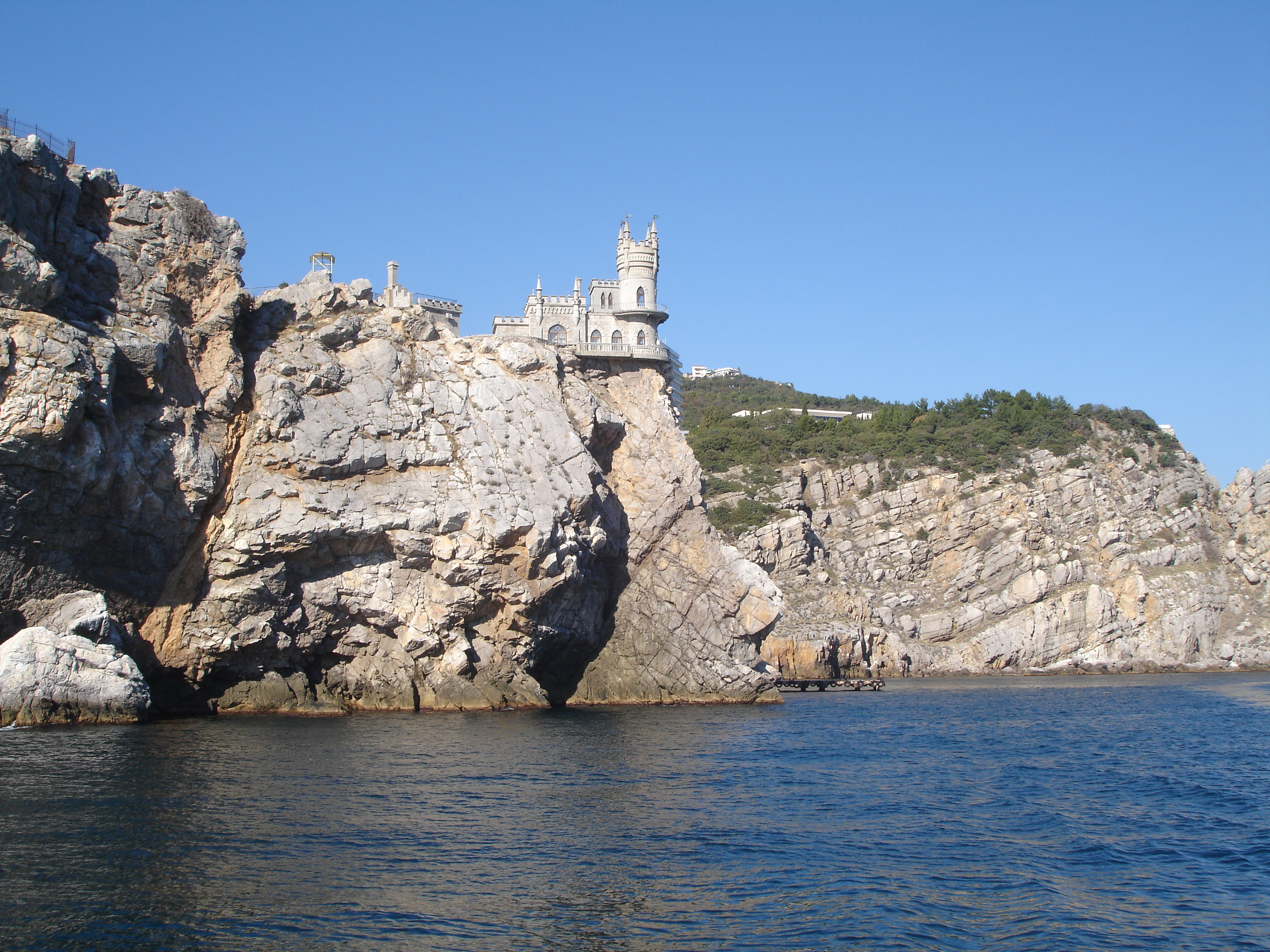 Ластівч. гніздо